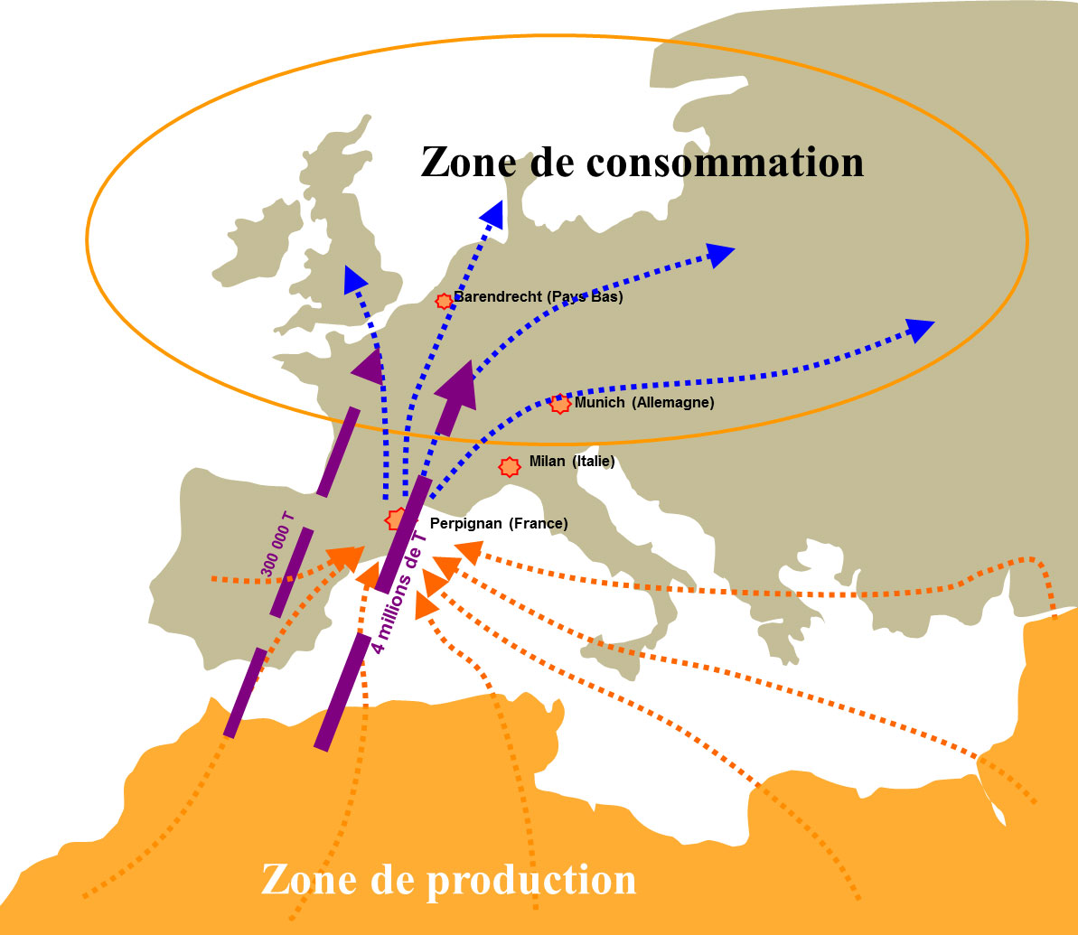 Production conso